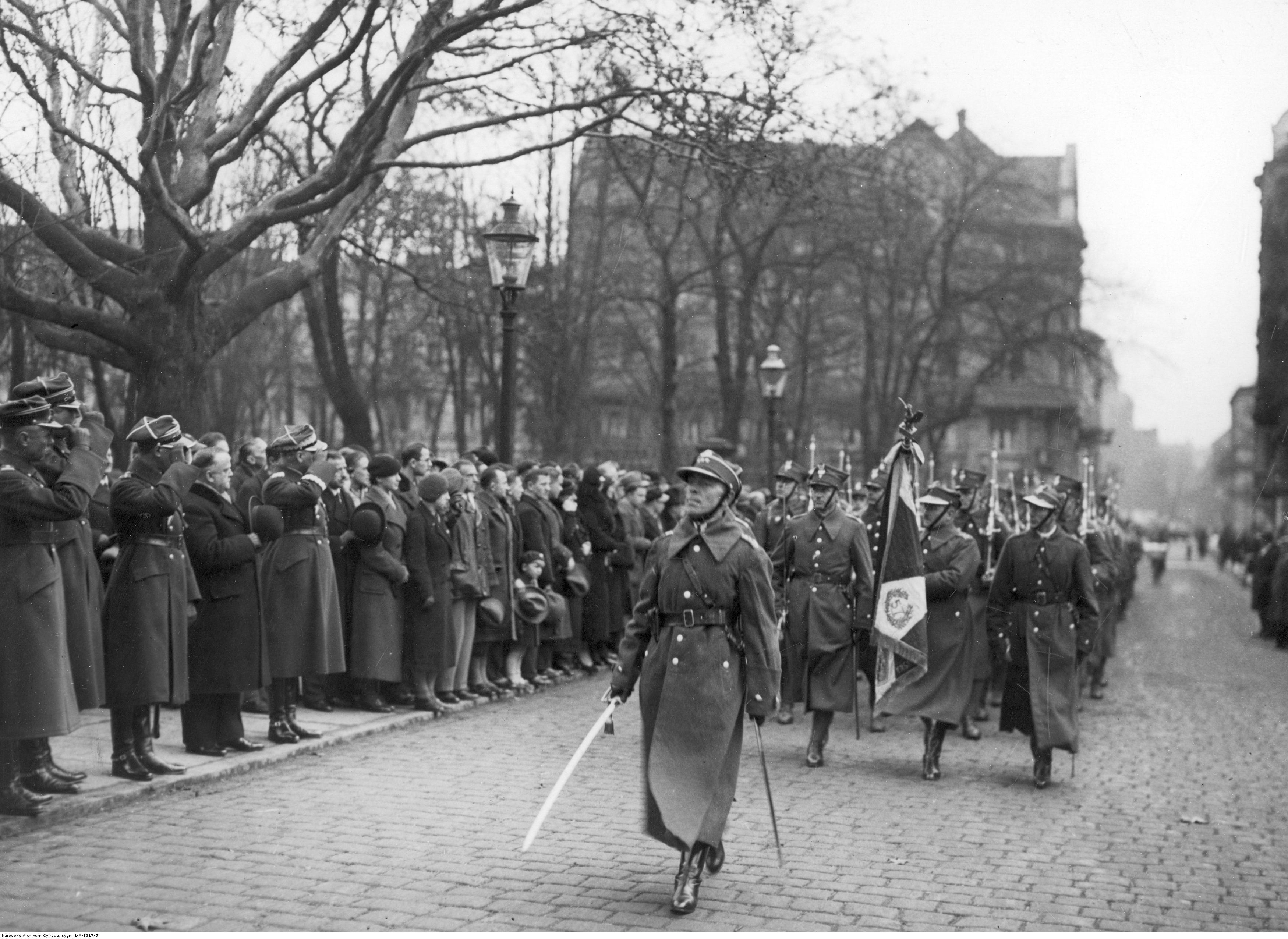 Wręczenie Poznaniowi odznaki honorowej 14 Wielkopolskiej Dywizji Piechoty ofiarowanej miastu z okazji 15-lecia tej dywizji - przemarsz wojska podczas uroczystości; Kompania honorowa 57 pp. 30 października 1934 r. Koncern Ilustrowany Kurier Codzienny - Archiwum Ilustracji. Sygnatura: 1-A-3317-5